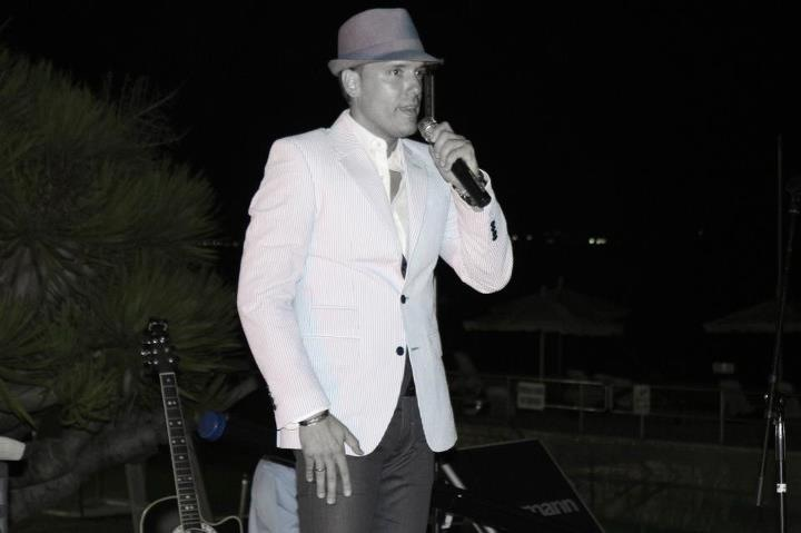 Foto del artista en el concierto benéfico(agosto 2012) del puerto de Santa María(Cádiz)